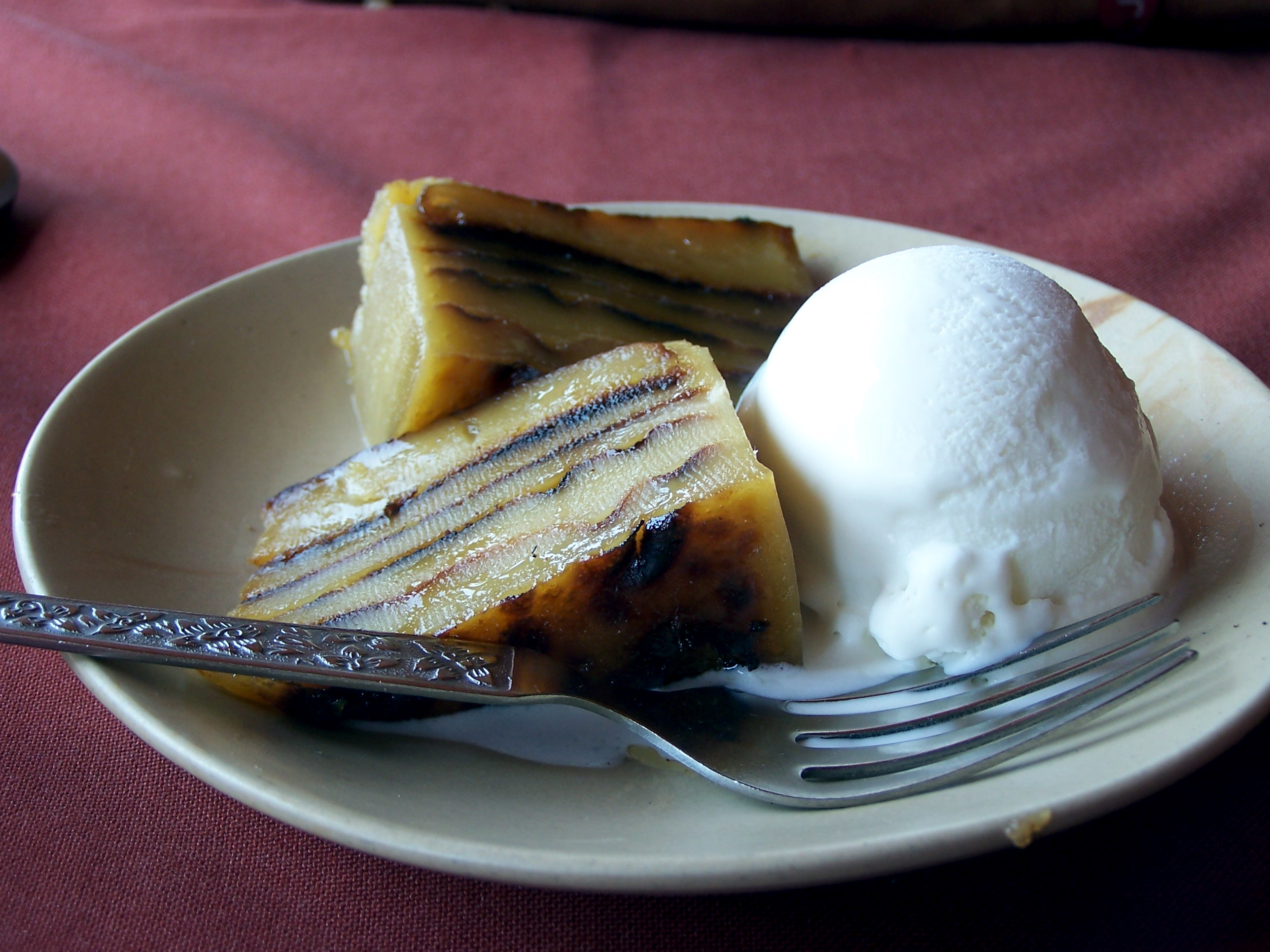 Bebinca, uma sobremesa tradicional de Goa, servida com uma bola de gelado. Bebinca, a traditional dessert from Goa, served with ice cream.